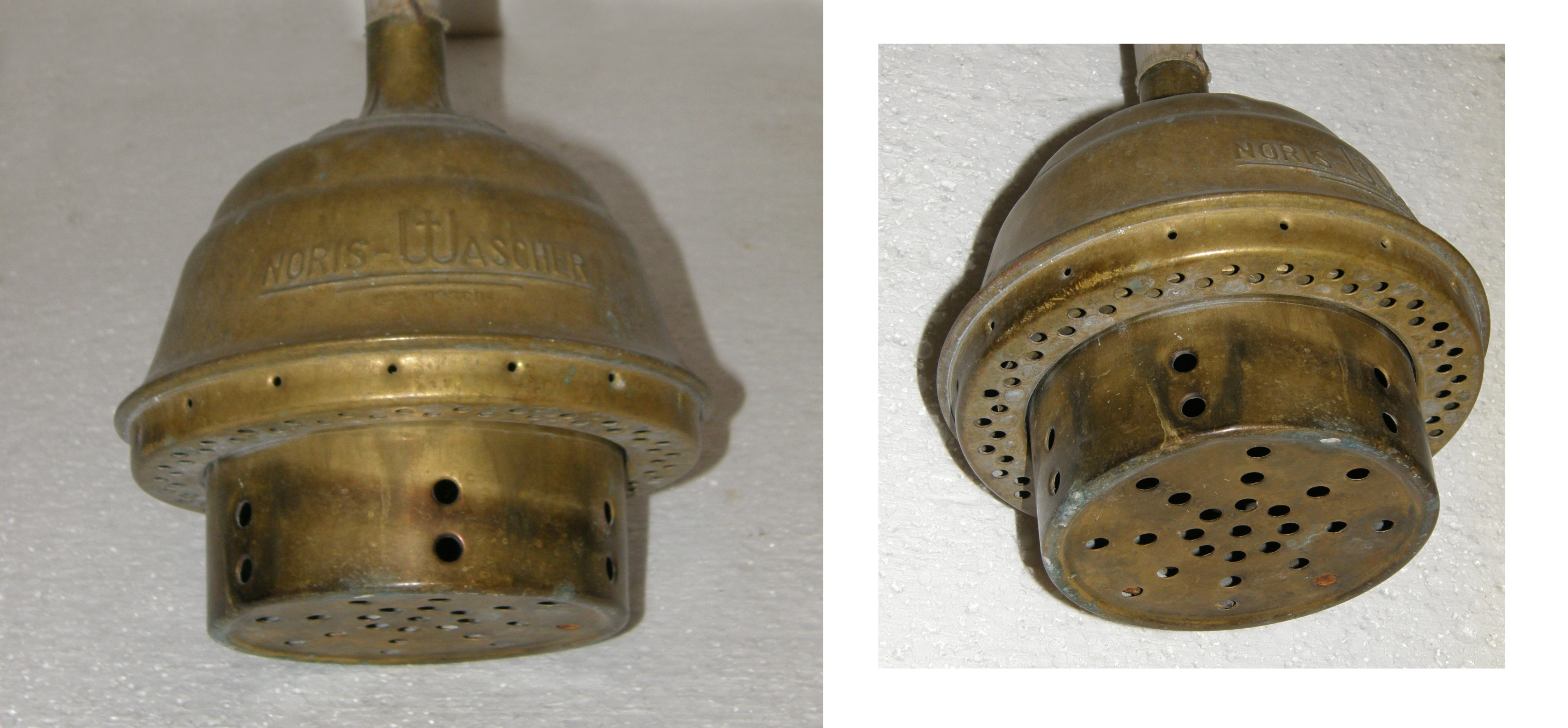 Wäschestampfer um 1900, seitlich und von unten